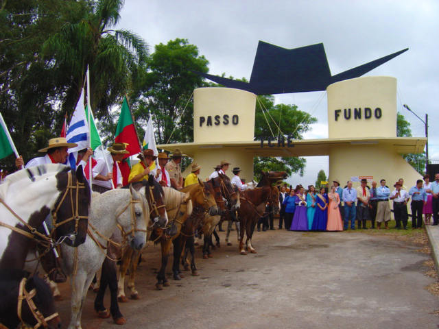 Cavaleiros em frente ao Parque de Rodeios Roselândia em Passo Fundo - Rio Grande do Sul